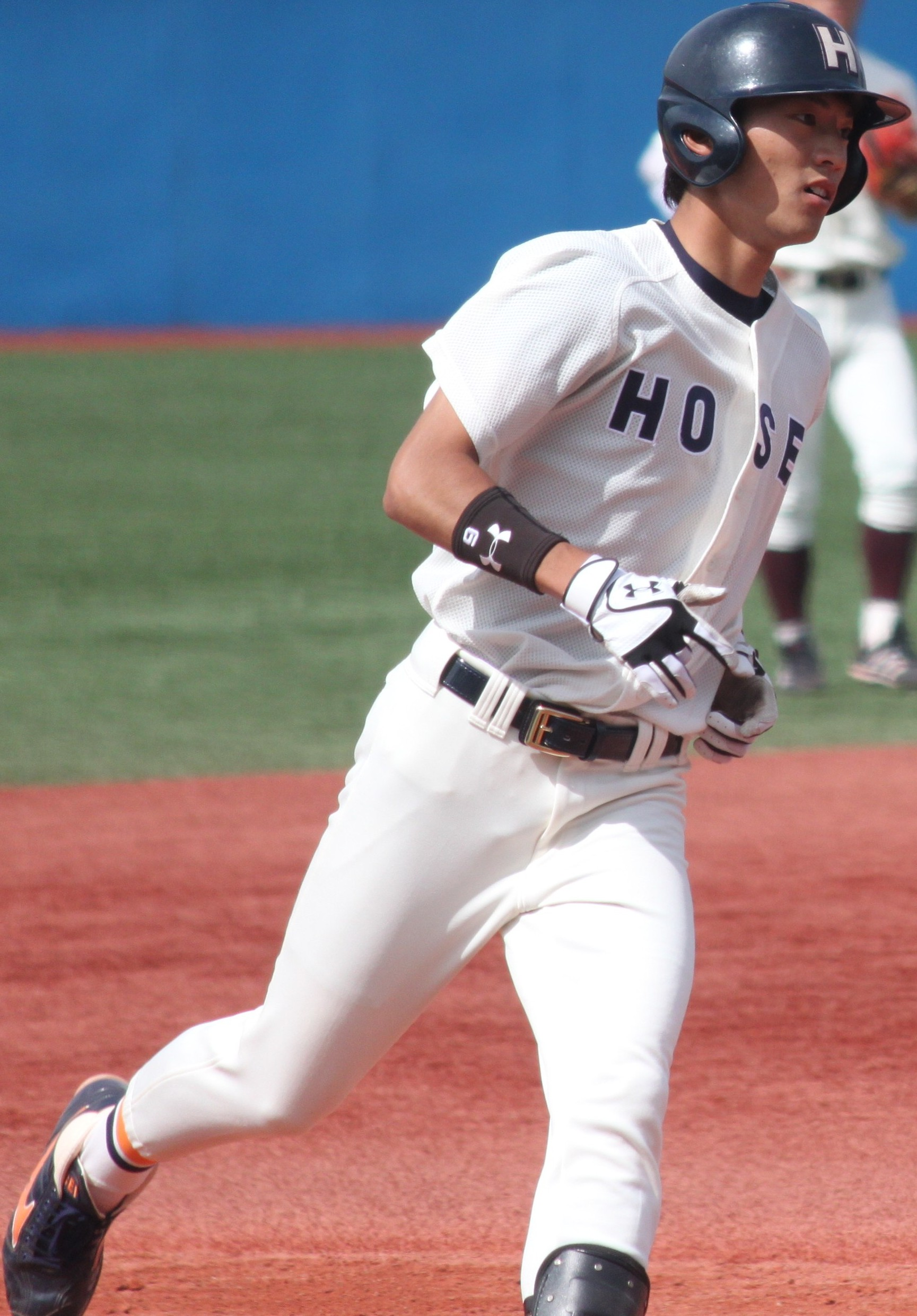 明治大学硬式野球部内野手の西浦直亨。明治神宮野球場にて。